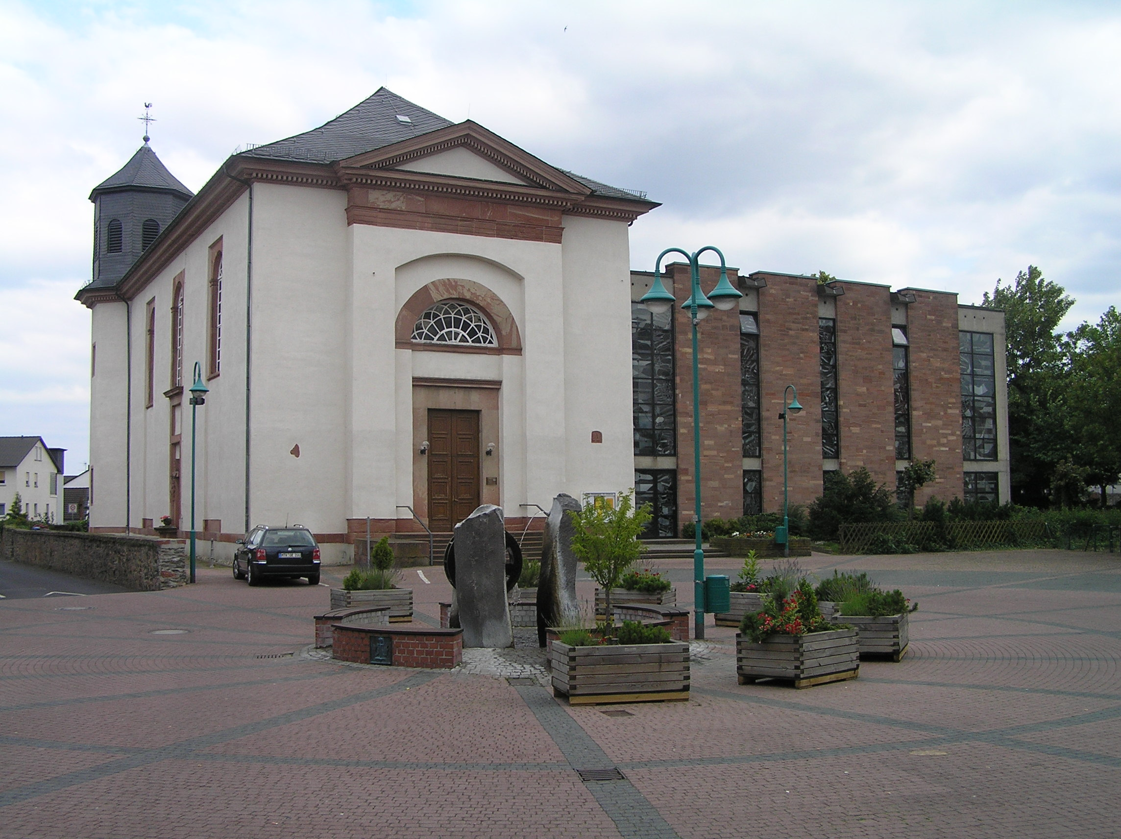 Katholische Kirche St. Dionysius in Kelkheim-Münster, Deutschland. Die Kirche war der erste klassizistische Kirchenbau in Nassau und wurde 1808 bis 1811 nach den Entwürfen von Christian Zais erbaut und 1969-1970 durch einen modernen Anbau erweitert.